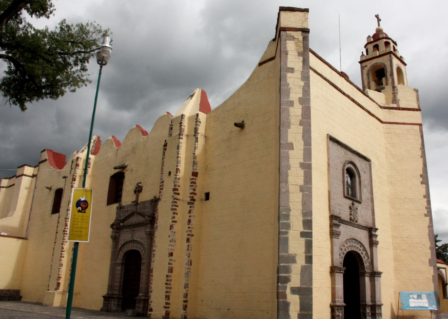 Igreja São Francisco de Assis, Tepeji del Rio, Estado de Hidalgo, México